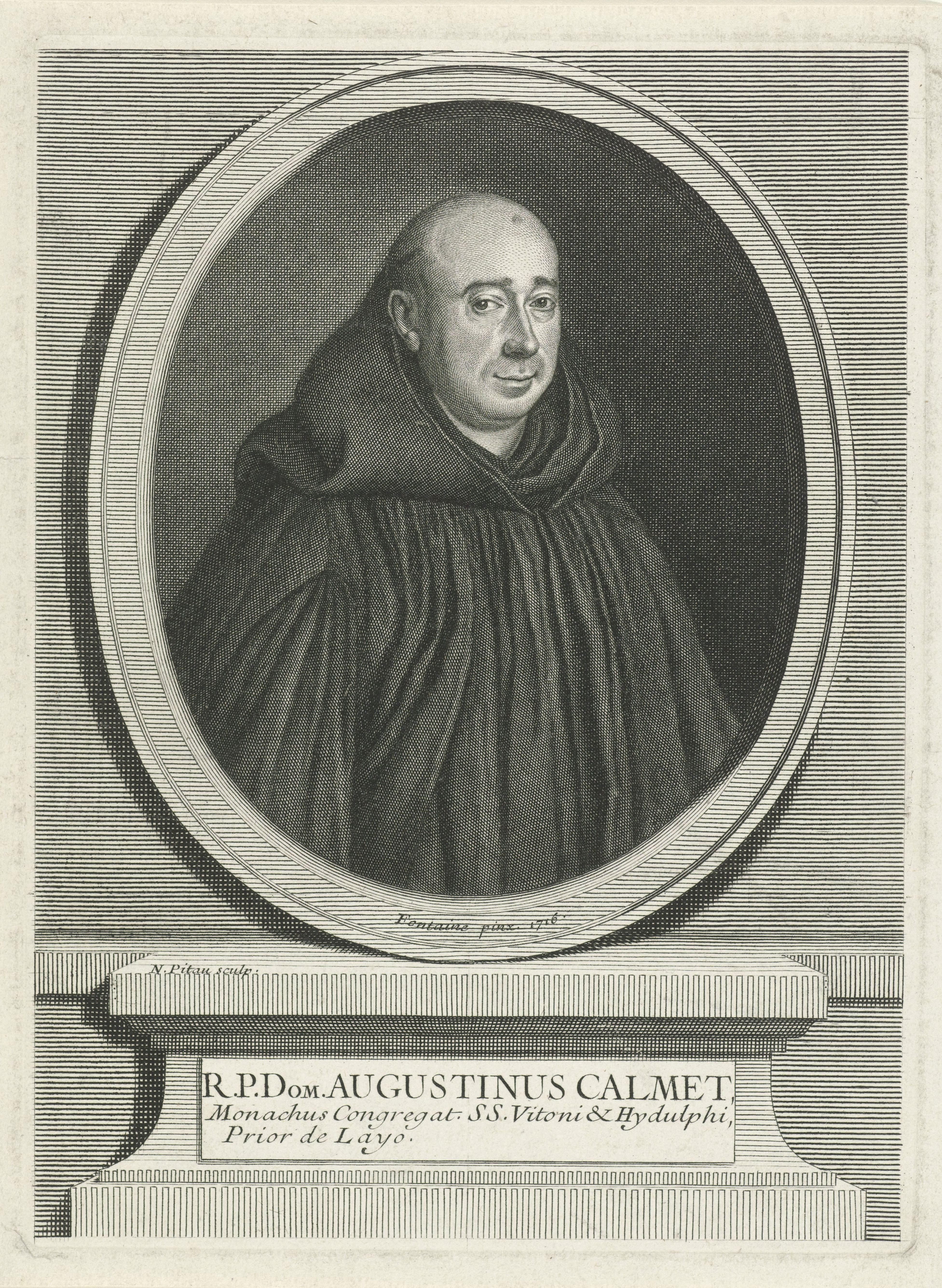 IdentificatieTitel(s): Portret van de theoloog Augustin CalmetObjecttype: prent Objectnummer: RP-P-1883-A-7537Opschriften / Merken: verzamelaarsmerk, verso onder, gestempeld: Lugt 2228VervaardigingVervaardiger: prentmaker: Nicolas Pitau (II) (vermeld op object)naar schilderij van: Fontaine (vermeld op object)Plaats vervaardiging: ParijsDatering: 1716Fysieke kenmerken: gravureMateriaal: papier Techniek: graveren (drukprocedé)Afmetingen: plaatrand: h 207 mm × b 153 mmOnderwerpWat: habit, frockVerwerving en rechtenVerwerving: aankoop 1883Copyright: Publiek domein